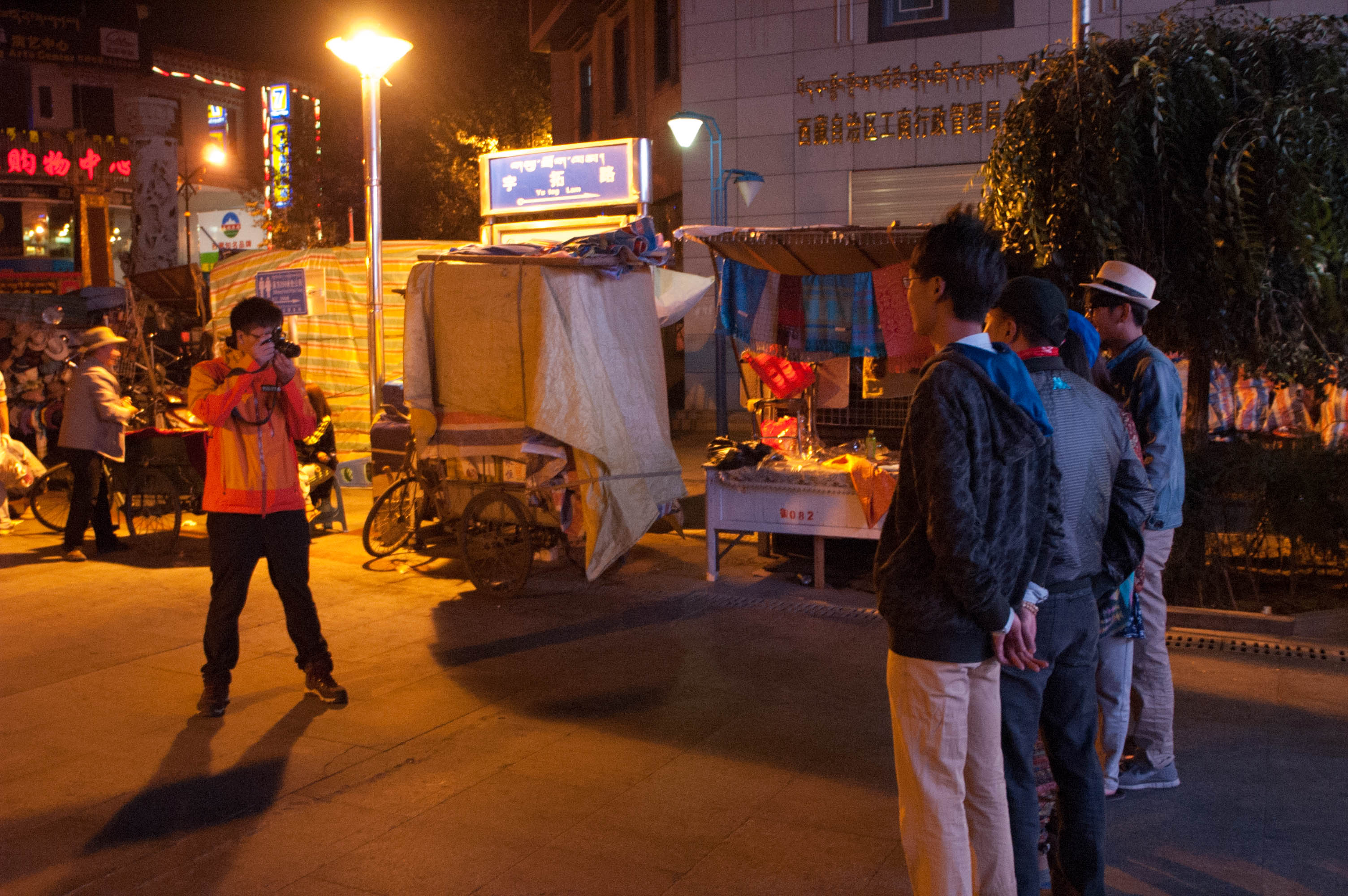 201308宇拓路夜市